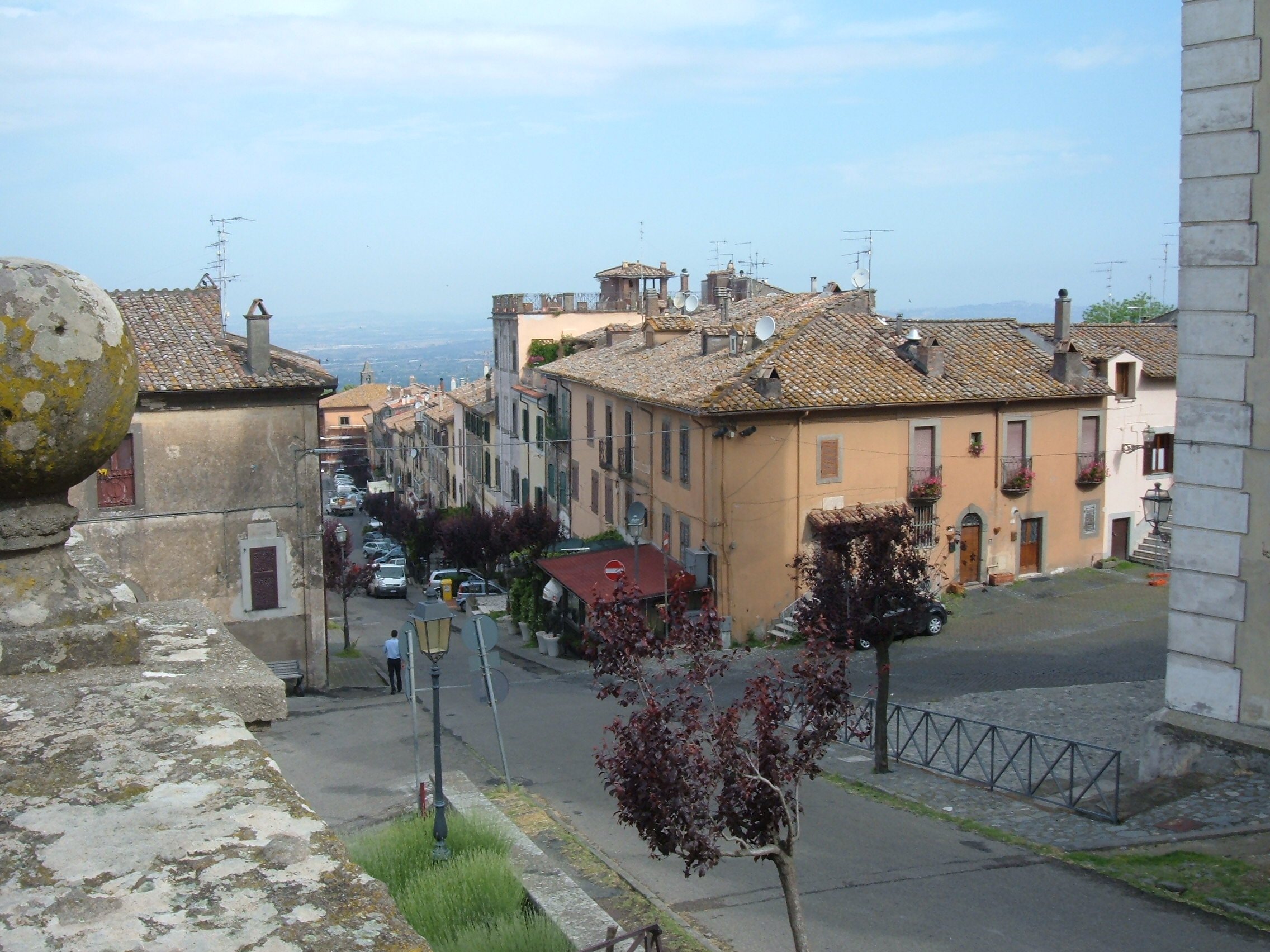 Vista di San Martino al Cimino